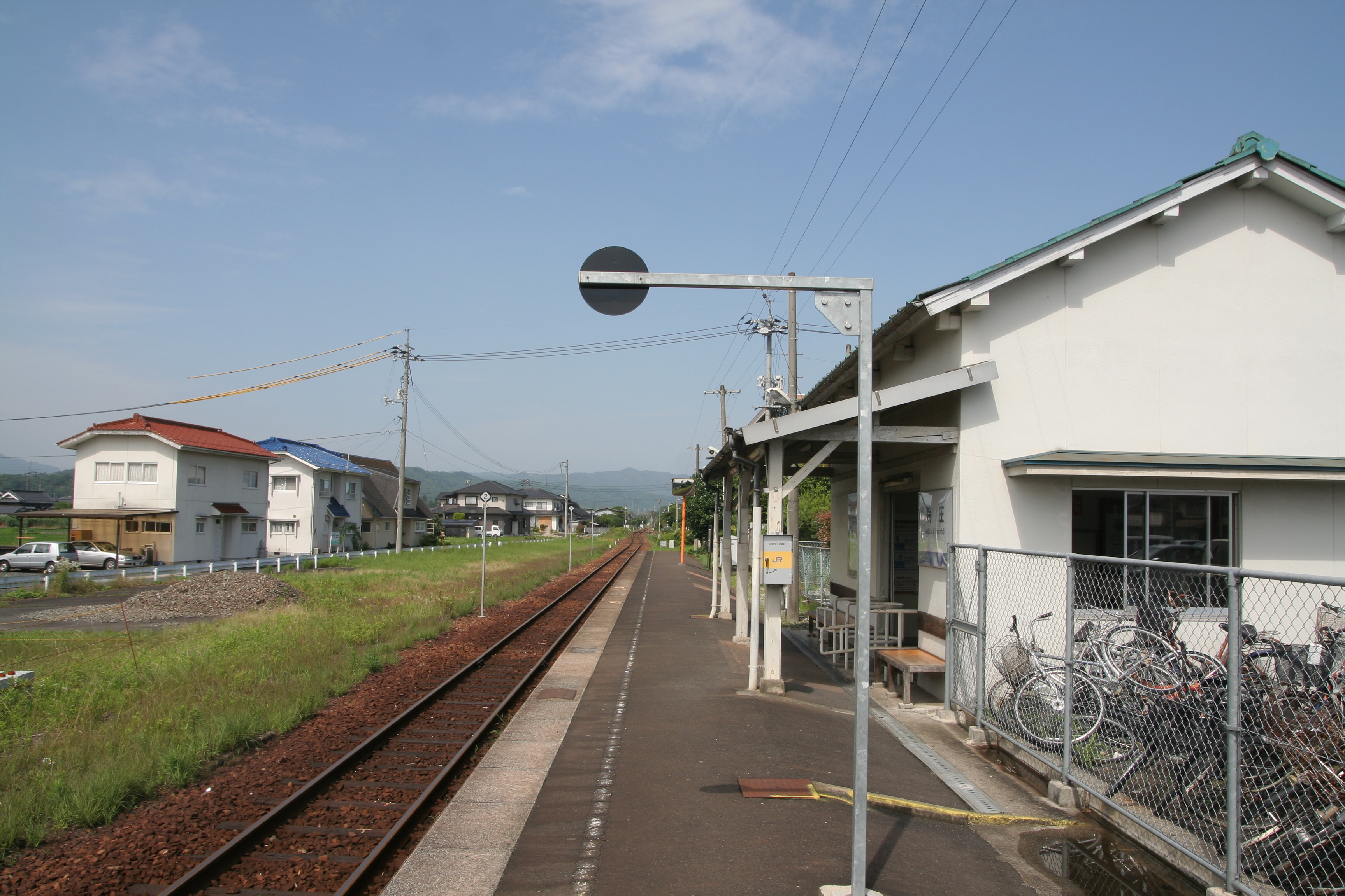 院庄駅の構内